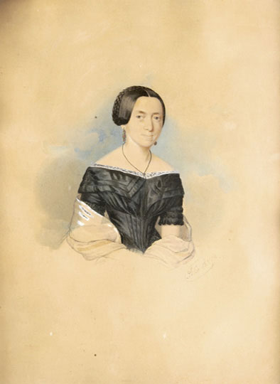 Székely Terézia portréja, 1849. Sikó Miklós (Seplér, 1818 - Marosvásárhely, 1900) festménye.